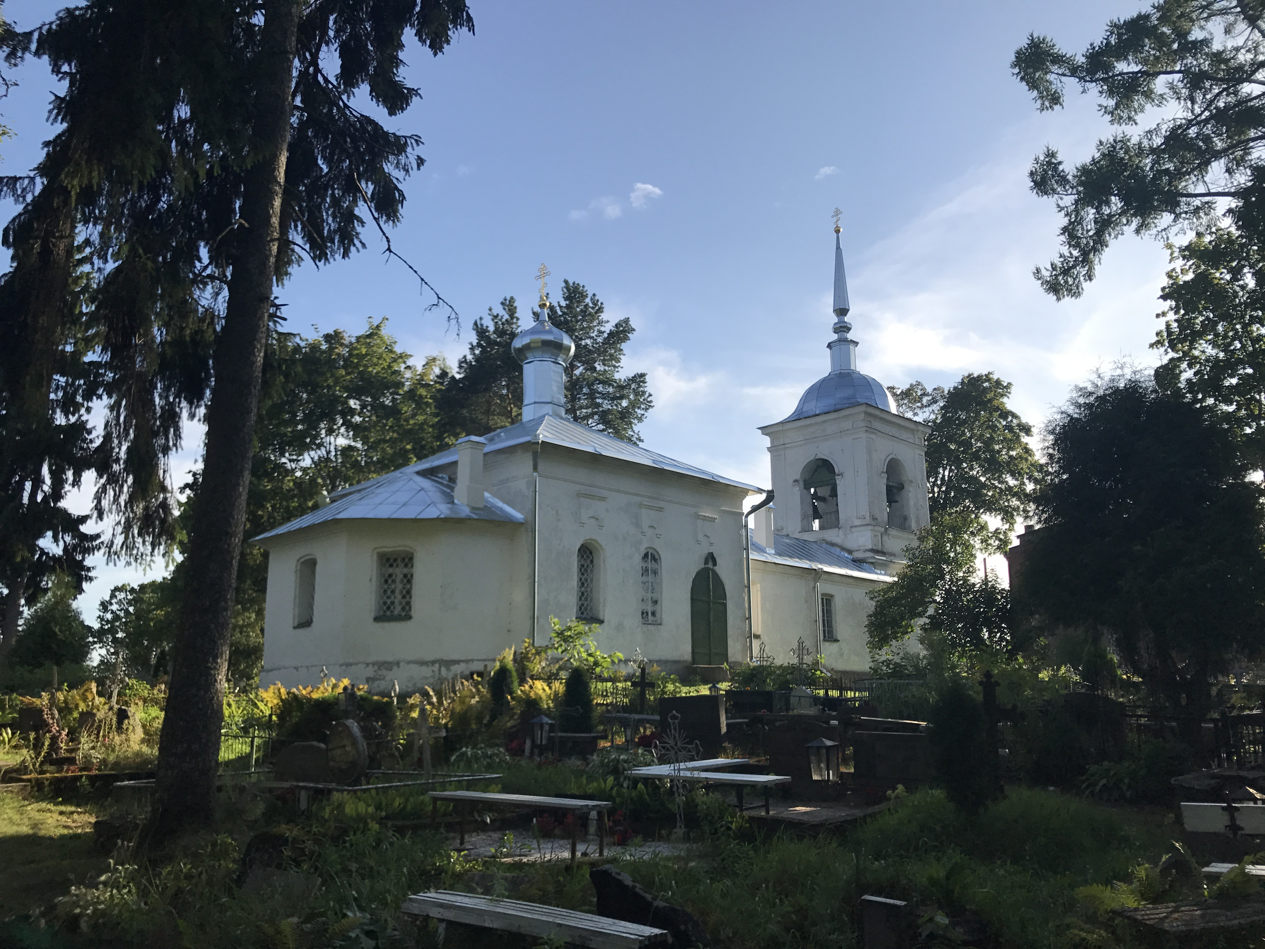 Saatse Püha Paraskeva kirik (2017)